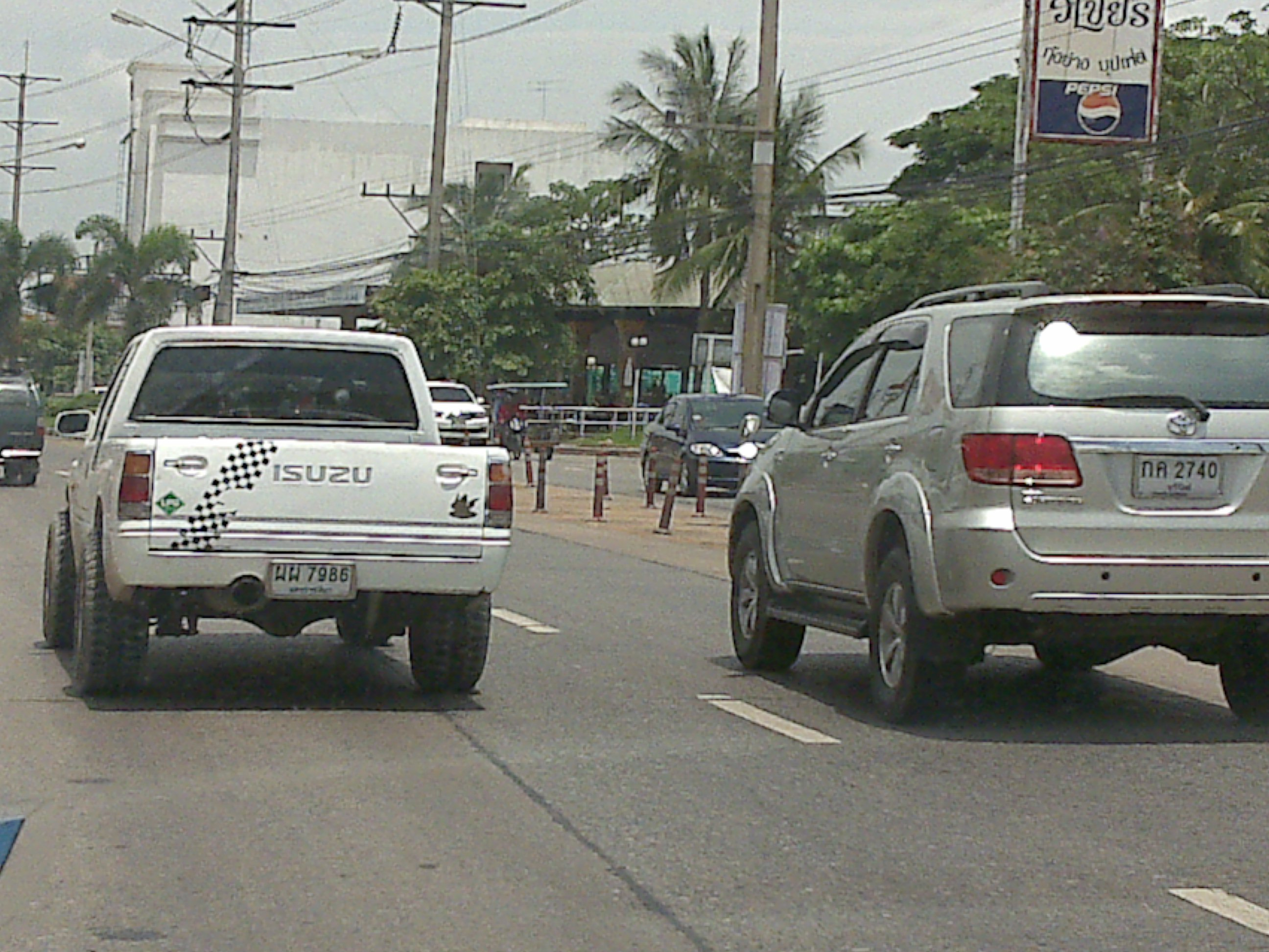 City of Nakhon Ratchasima, Thailand